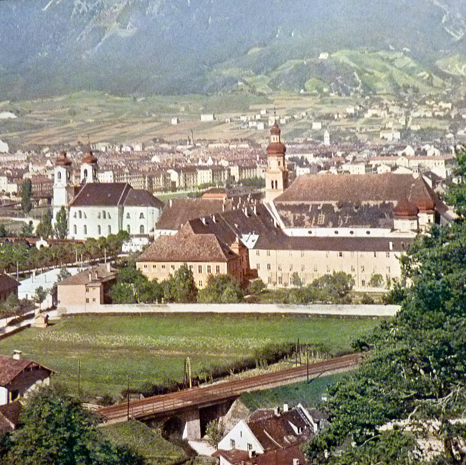 Ansicht von Wilten um 1900